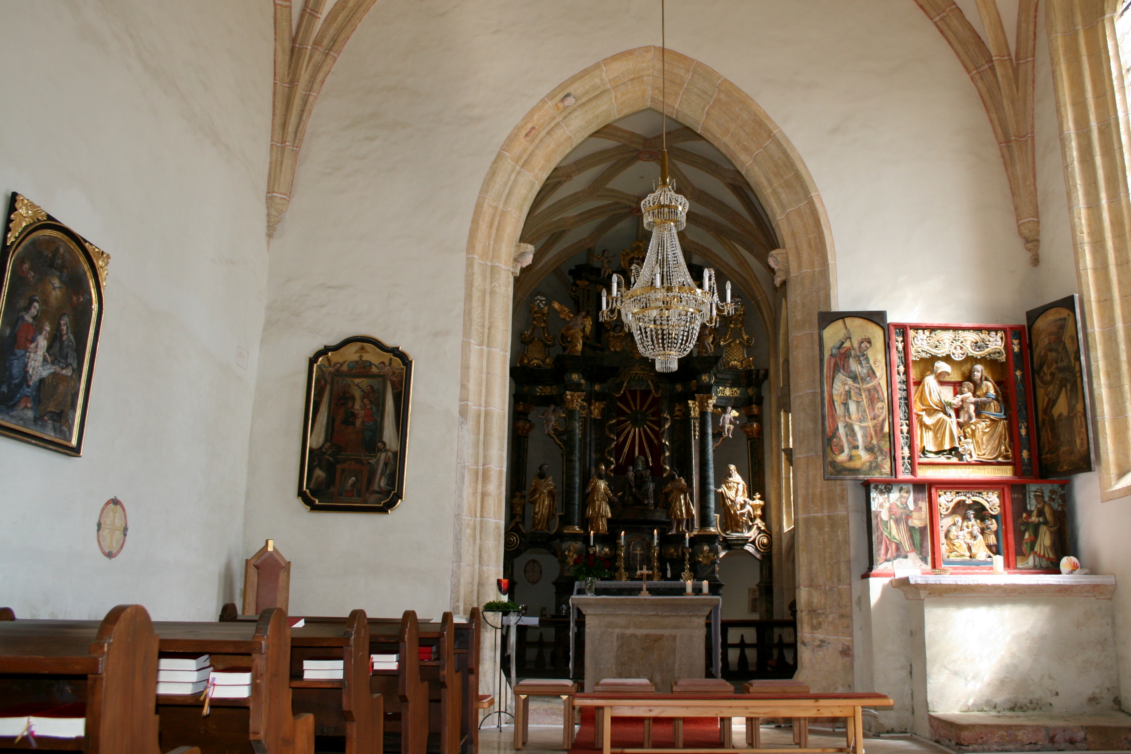 Kath. Filialkirche St. Anna am Masenberg, Innenansicht